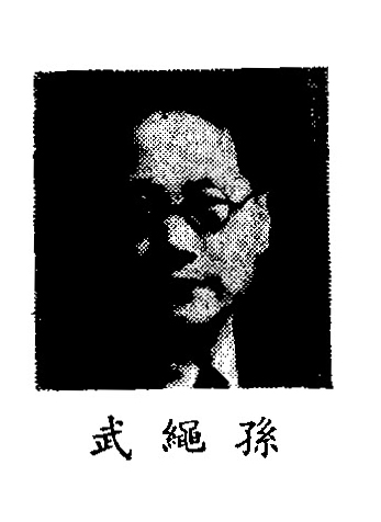 中文（中国大陆）: 制憲國民大會代表